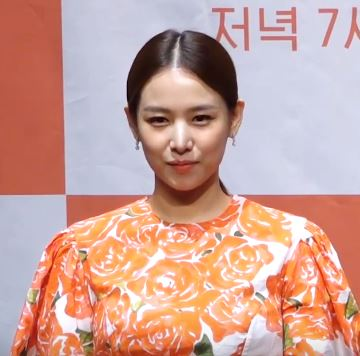 KBS 2TV 새 주말드라마 ‘사랑은 뷰티풀 인생은 원더풀’ (사풀인풀) 제작발표회가 25일 오후 서울시 구로구 라마다 서울 신도림 호텔에서 열렸다.